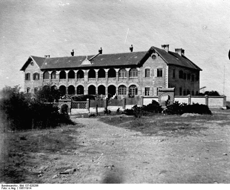 Tsingtau, Missionshaus der Berliner Missionsgesellschaft China, Tsingtau.- Missionshaus der Berliner Missionsgesellschaft in Tsingtau.